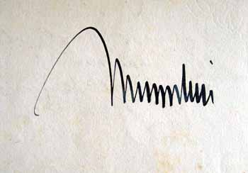 La firma di Mussolini